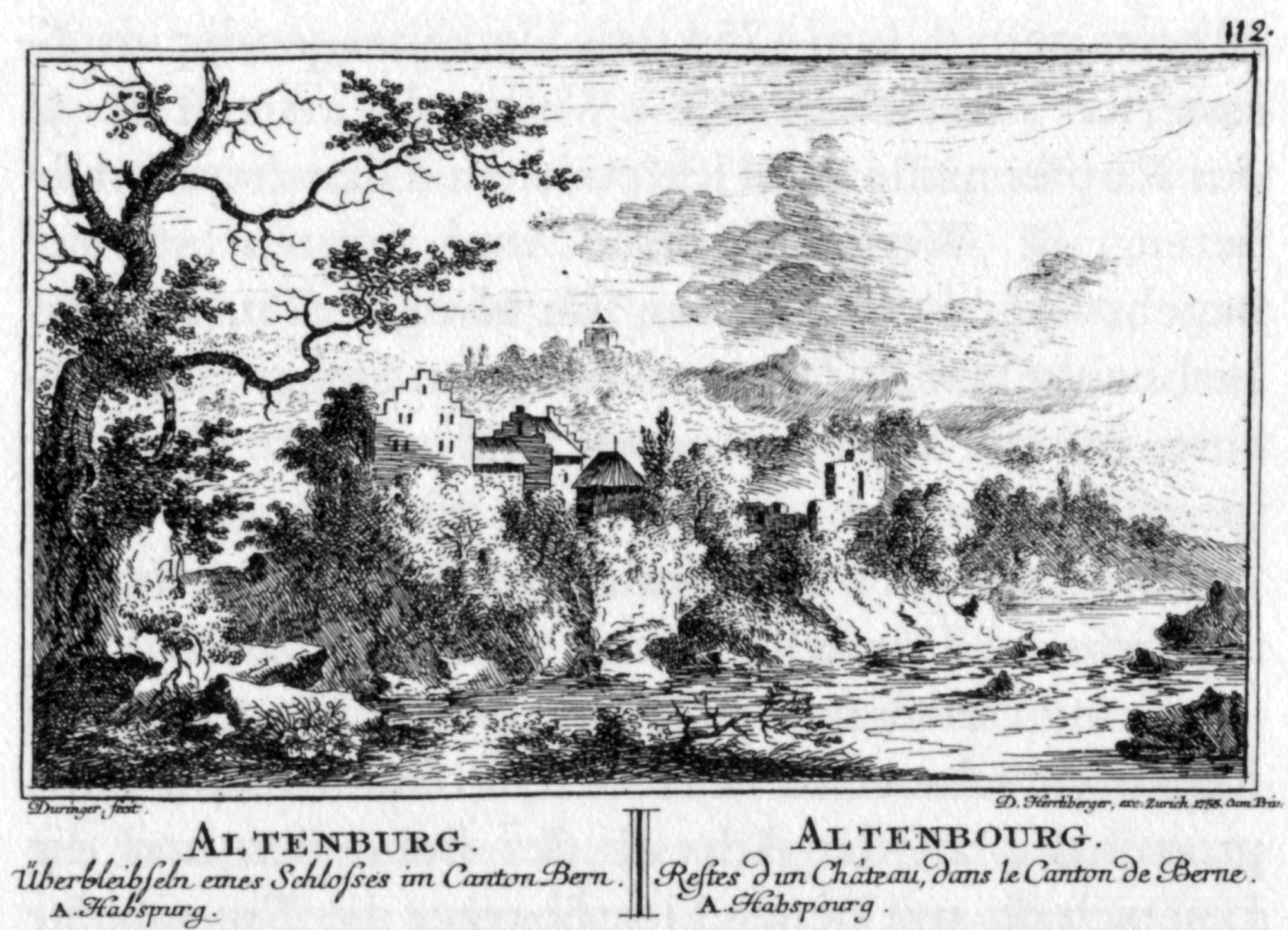 Schloss Altenburg 1758. Blatt 112 der Topographie der Eidgenossenschaft. Kupferstich von David Herrliberger nach einer Zeichnung von Daniel Düringer